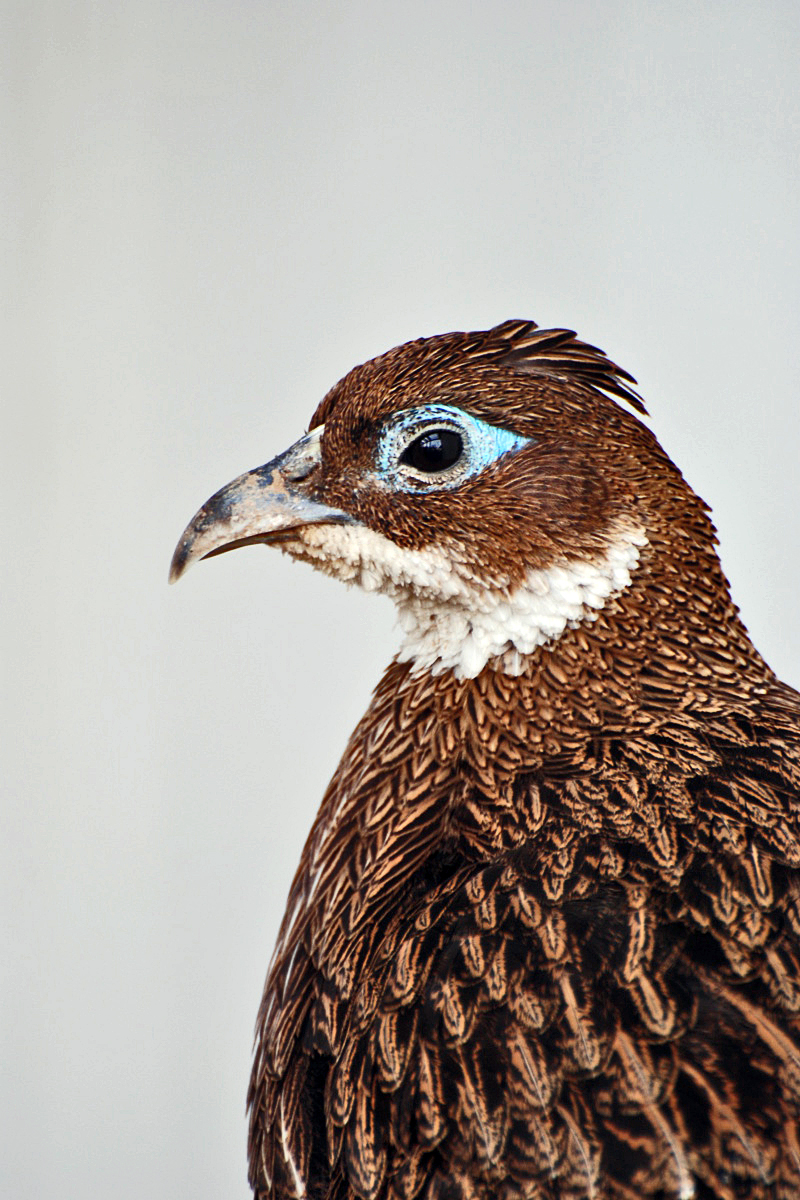 Himalayan Monal